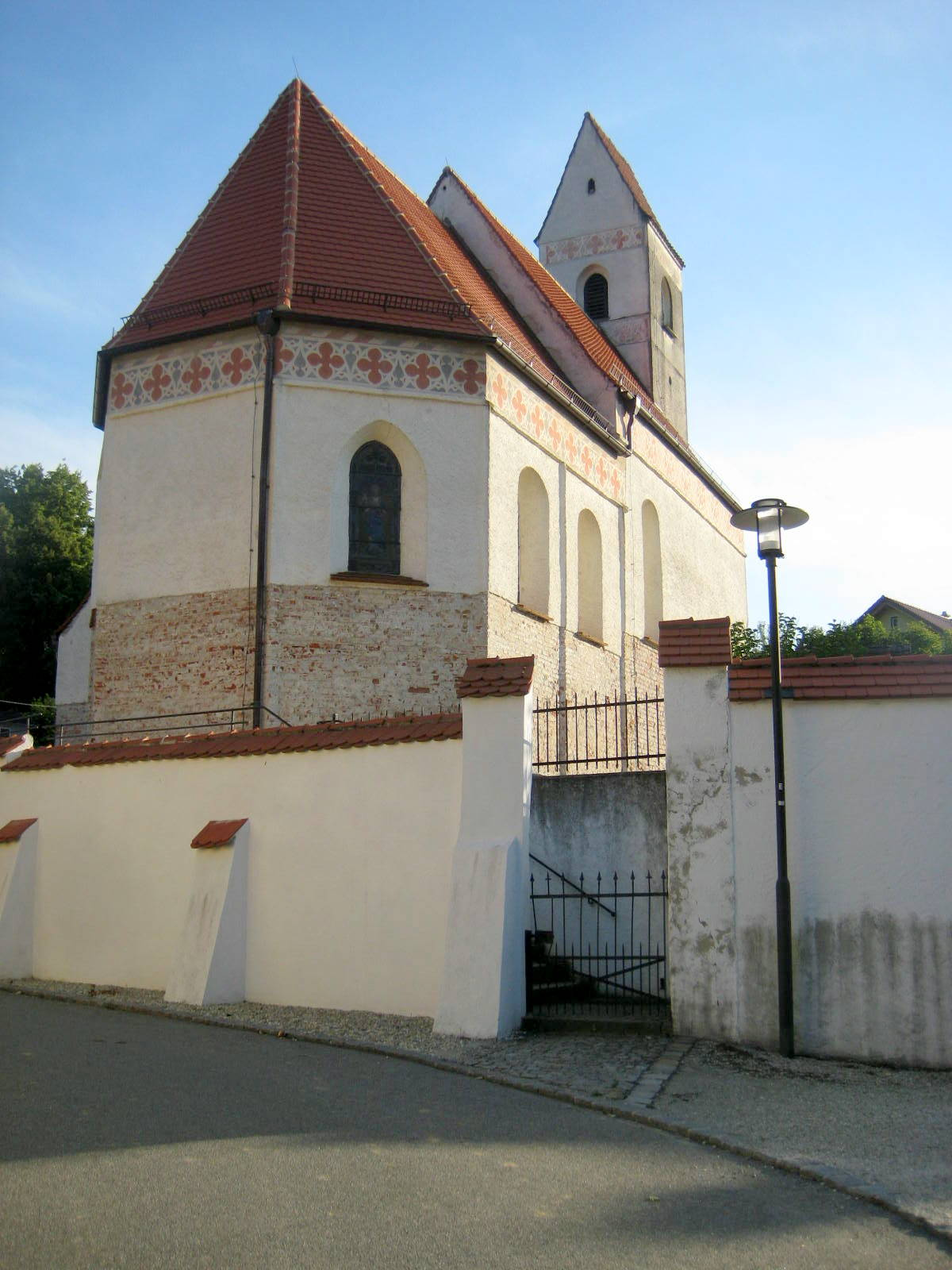 Diese Filialkirche aus dem 15. Jh. besitzt auch eine alte Friedhofsummauerung.